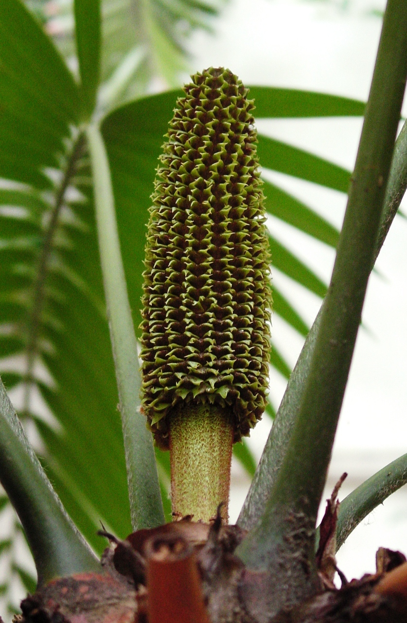 Ceratozamia mexicana pollen cone (Giardino dei Semplici, Florence, Italy)